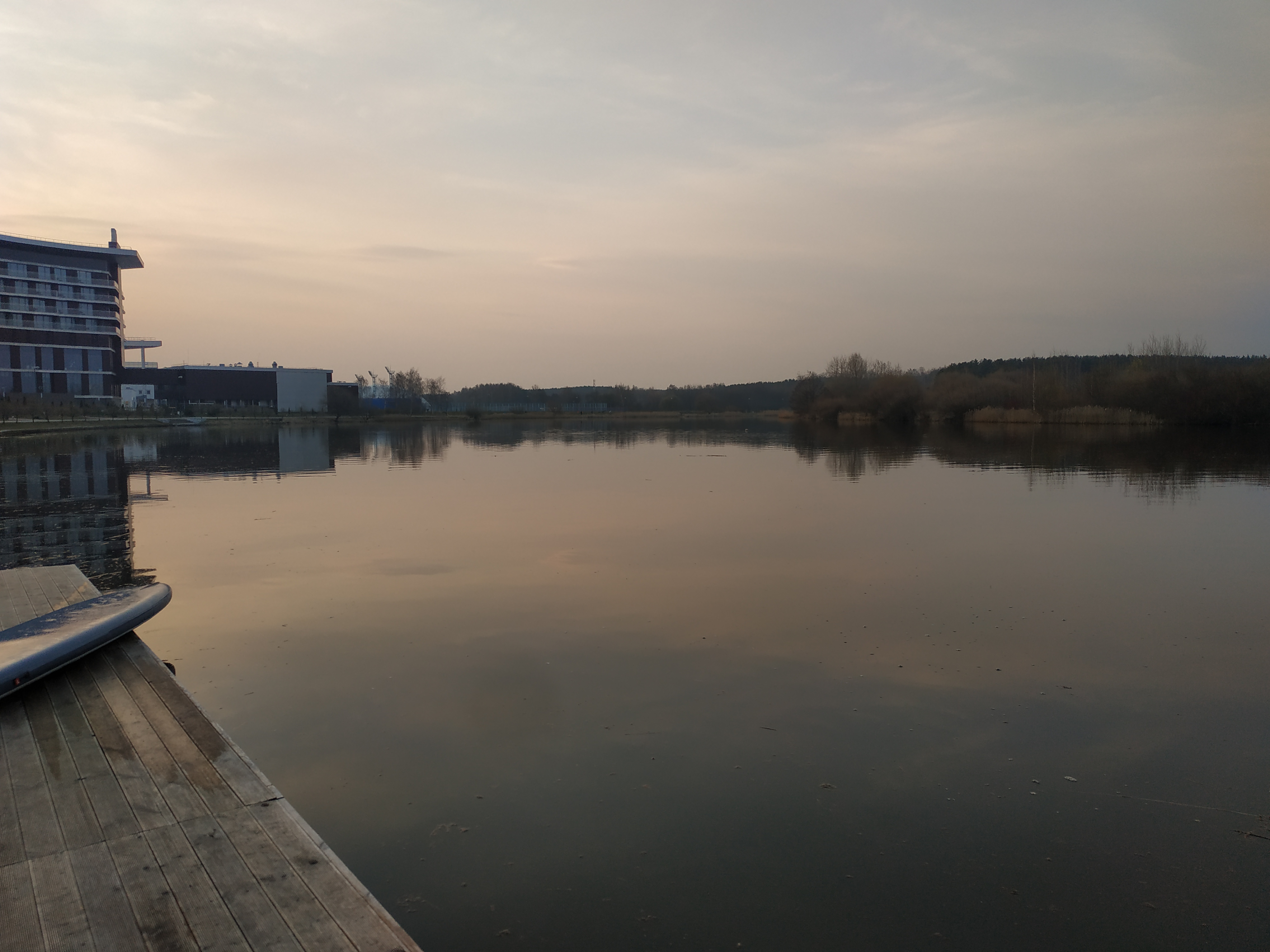 Река Свислочь. Фотография была сделана в Центральном Районе г. Минска. Координаты где было сделано фото: 53.933499, 27.513864